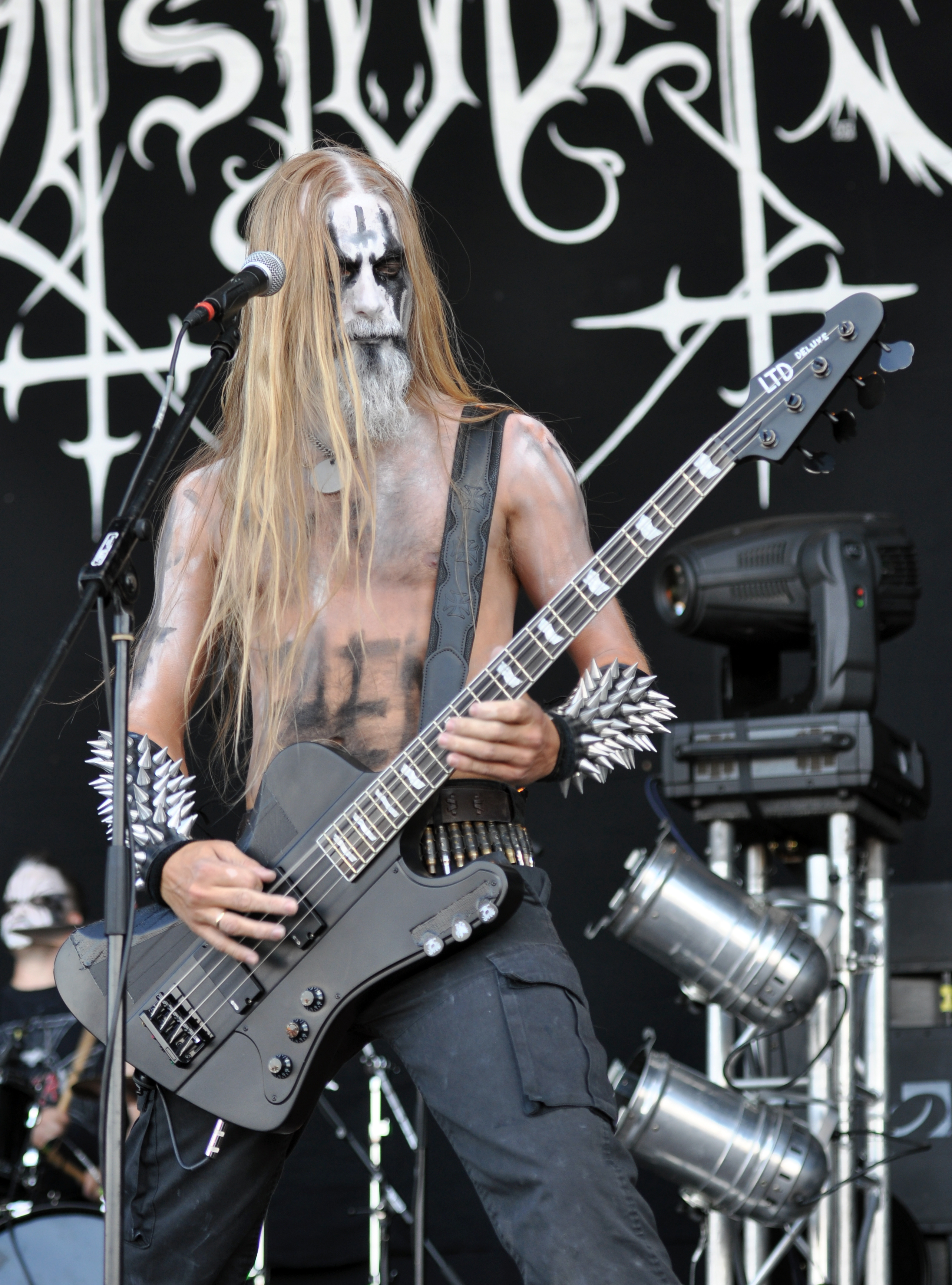 Tsjuder at Party.San Metal Open Air 2013